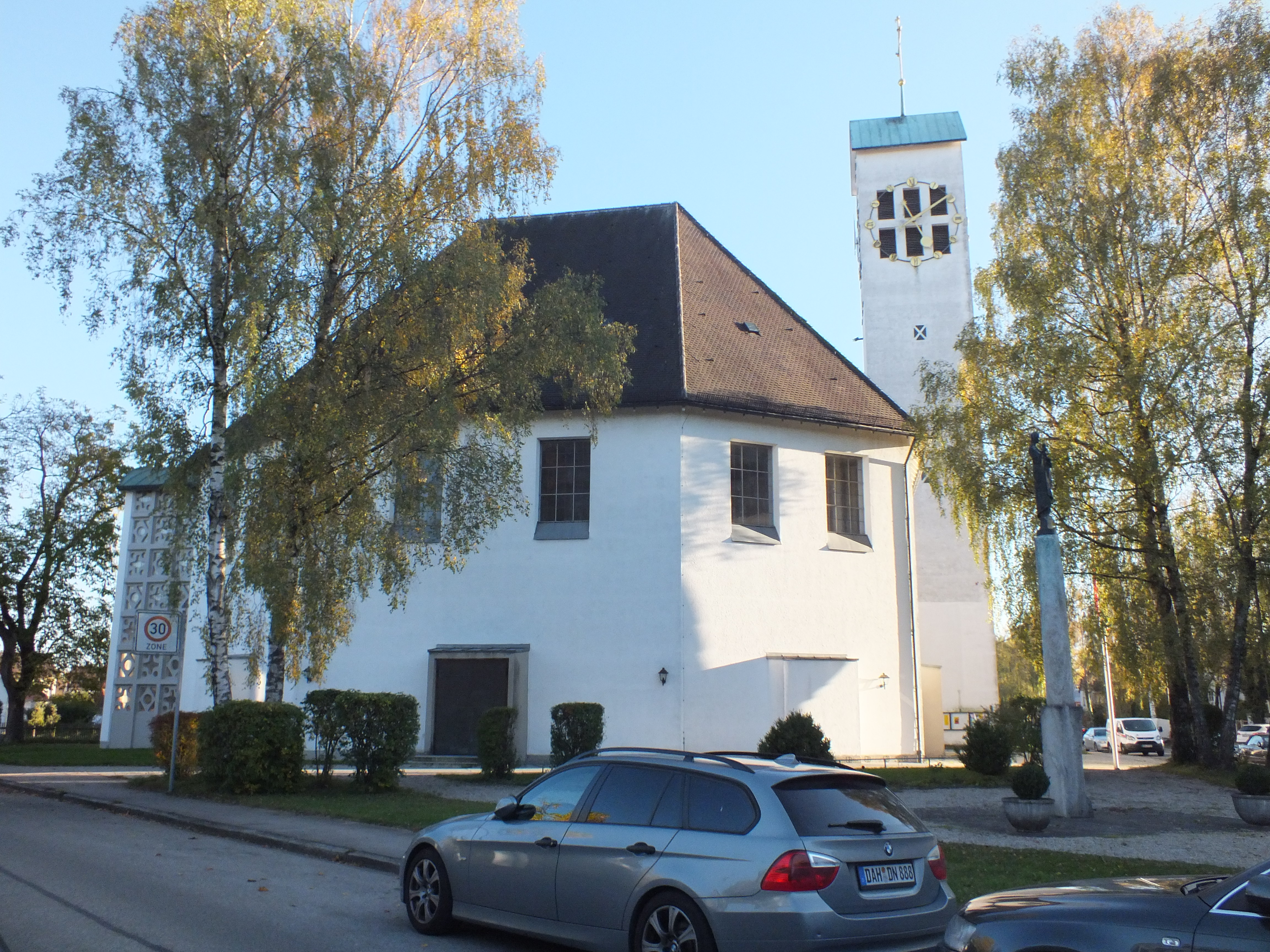 Dachau, Am Heideweg 1: Kirche Mariae Himmelfahrt